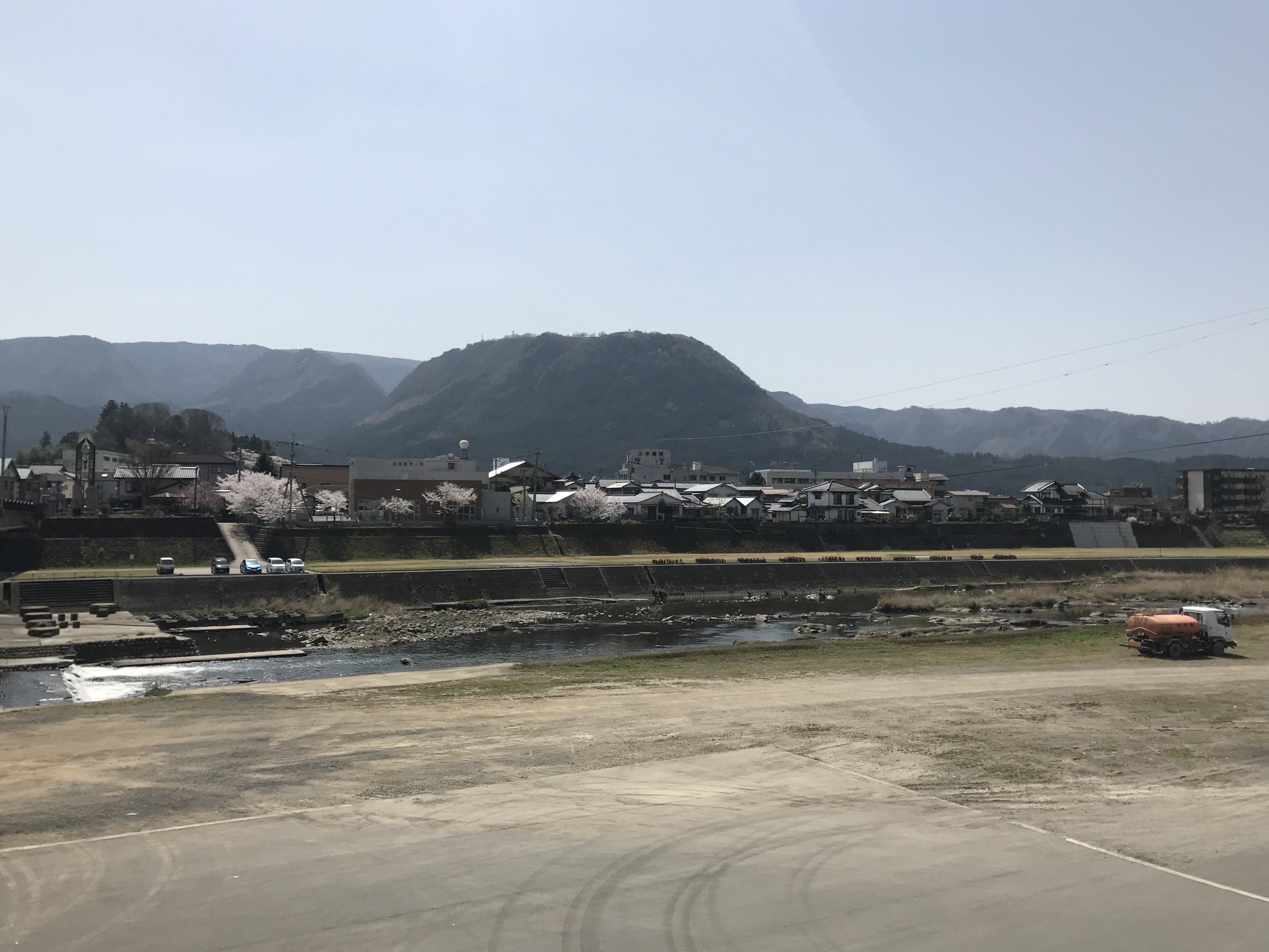 協心橋北側より望む玖珠川と伐株山